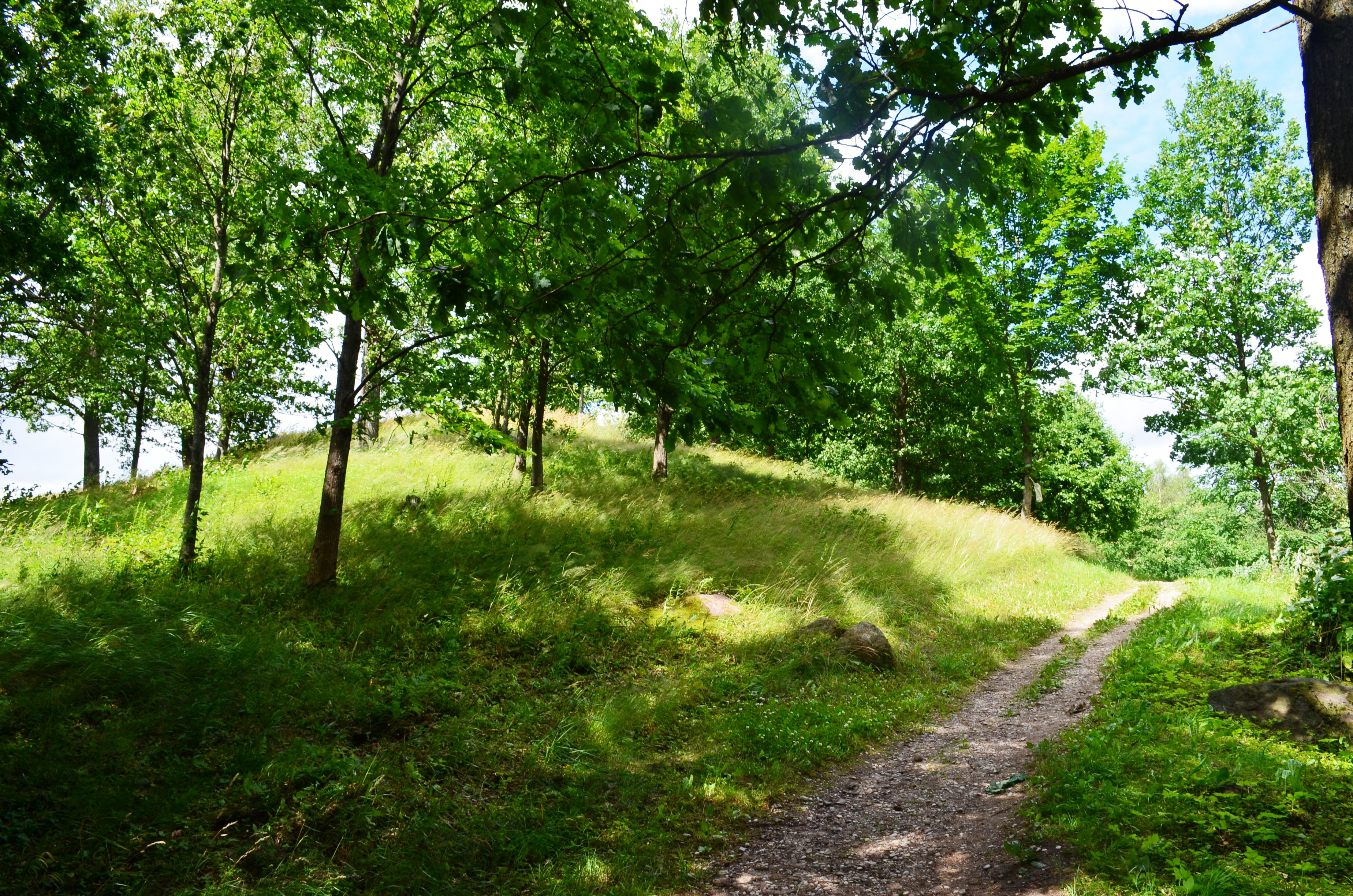 Lopaičių piliakalnis, Rietavo sav. Žemaitėška: Luopaitiu pėliekalnis, Rėitava sav.